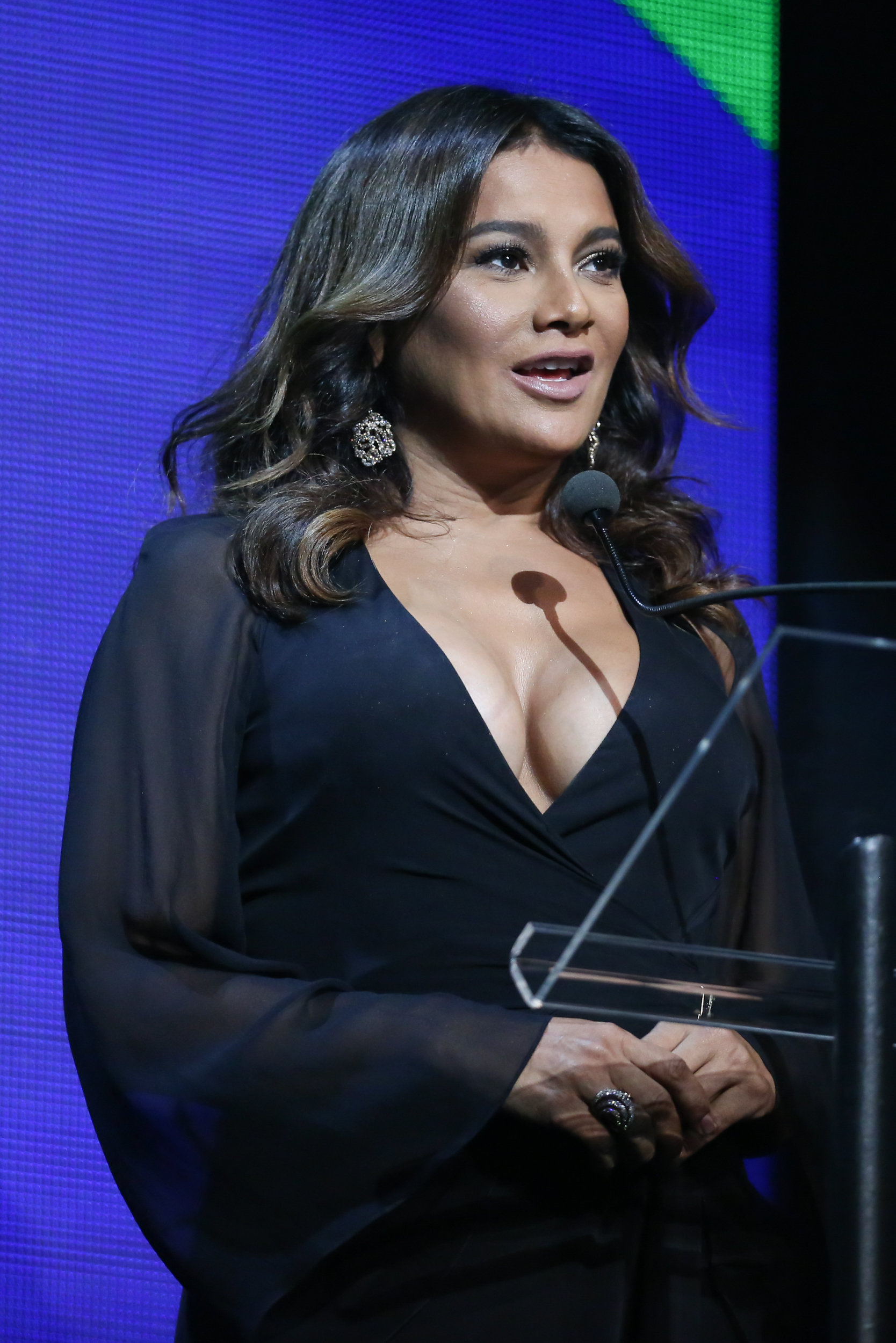 Dira Paes - 26° Prêmio da Música Brasileira 2015, no Theatro Municipal, no Centro do Rio de Janeiro/RJ. (10/06/15) Foto: Roberto Filho/Divulgacão